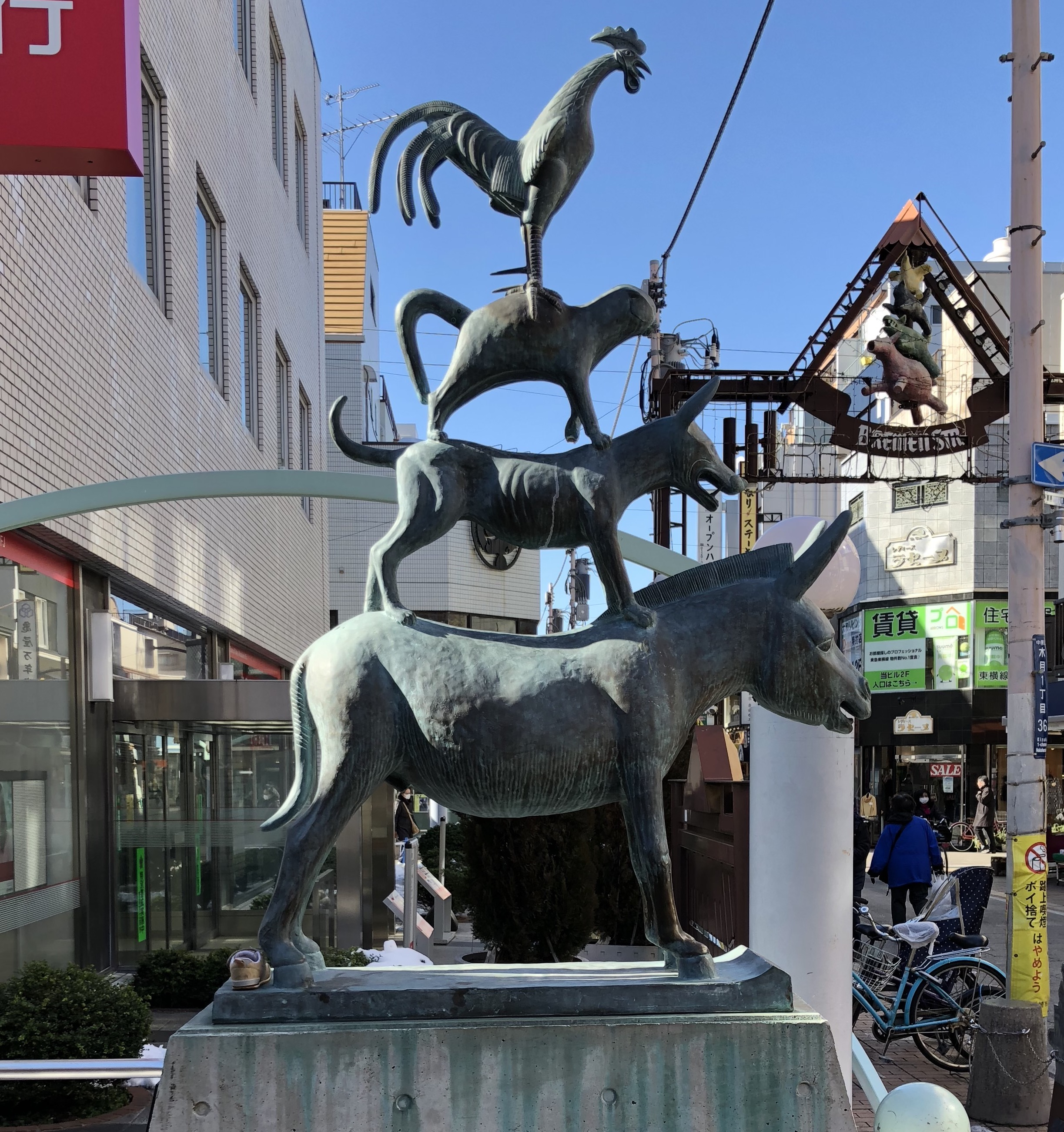 神奈川県川崎市中原区、東横線元住吉駅西口前にあるブレーメン通り商店街の「ブレーメン音楽隊」像